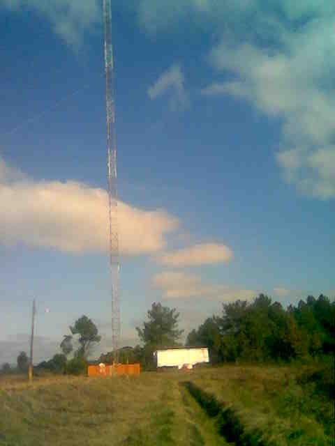 Torre de uma Ionosonda. Freqüência - 32 KHz - Potência 1.300.000 W. Este equipamento se destina ao estudo da AMAS, Anomalia Magnética do Atlântico Sul.